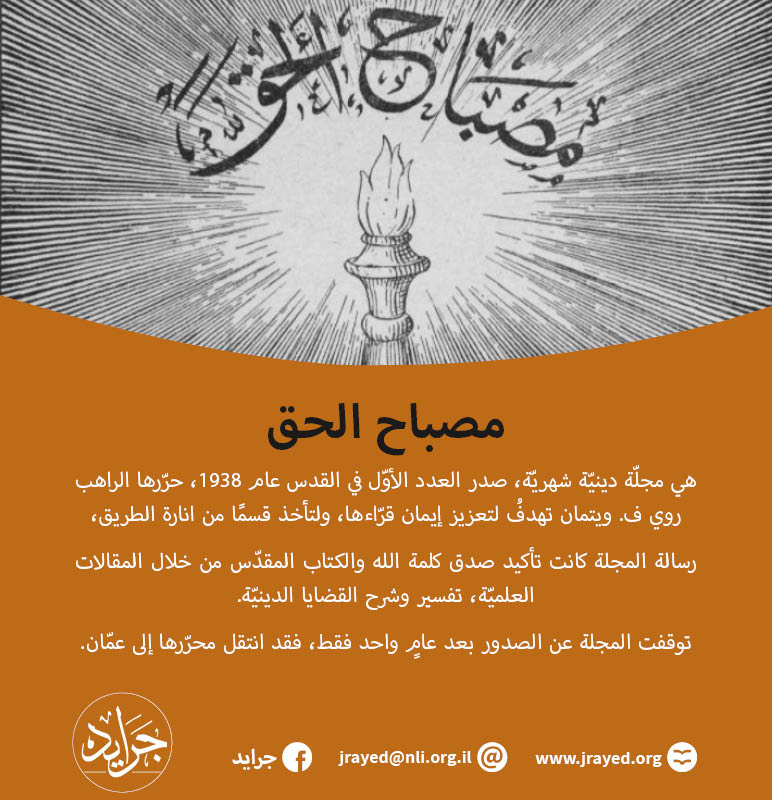 عن مجلة مصباح الحق - ضمن زاوية "جرايد من بلدنا"